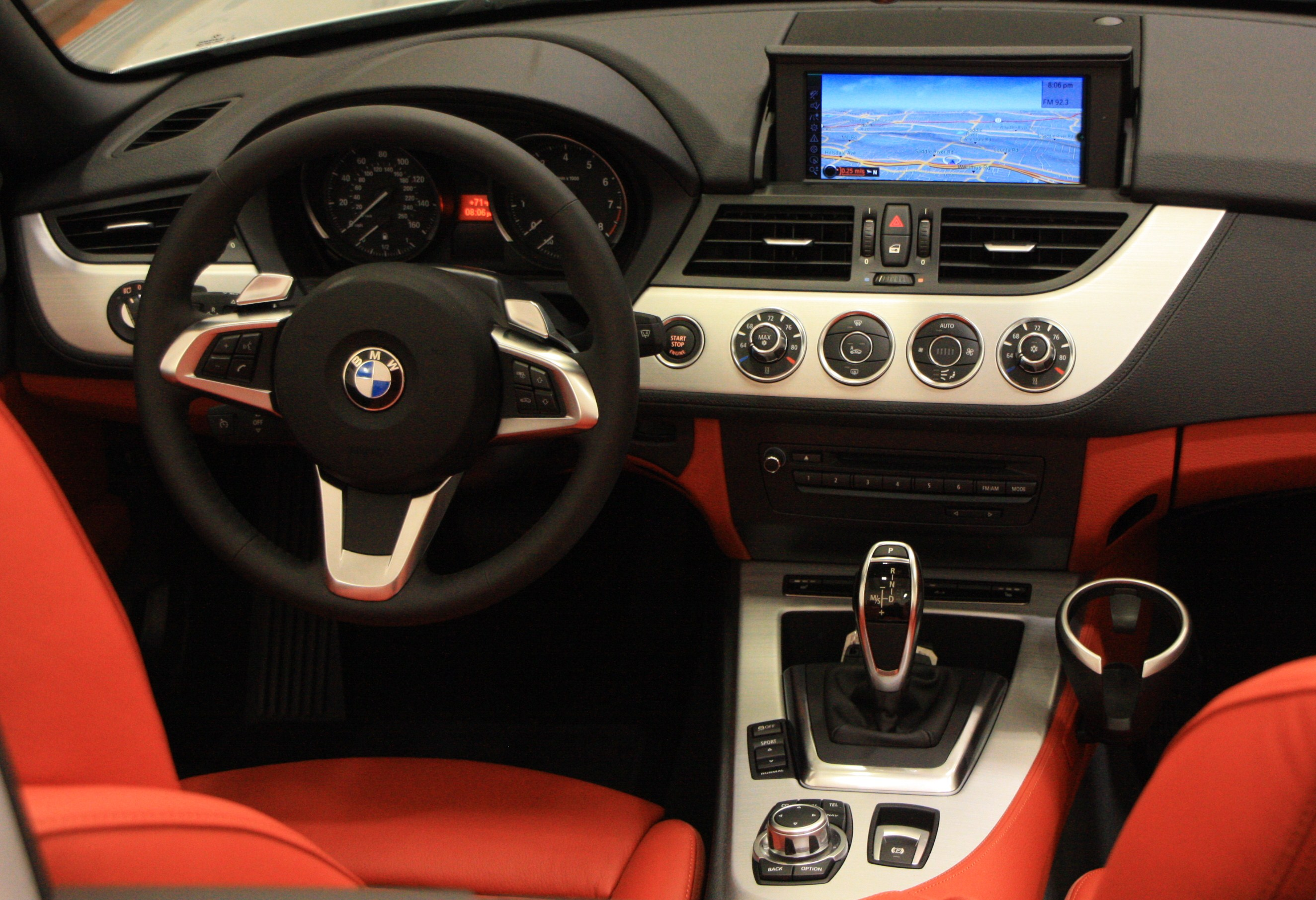 Intérieur de la BMW Z4 E89